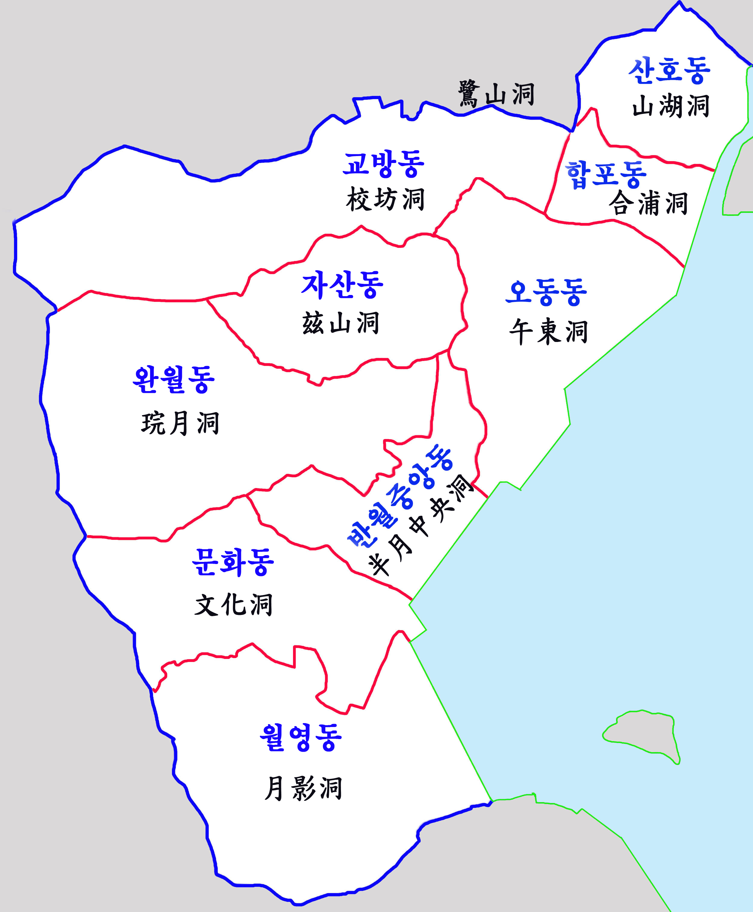 창원시 마산합포구 시내구역